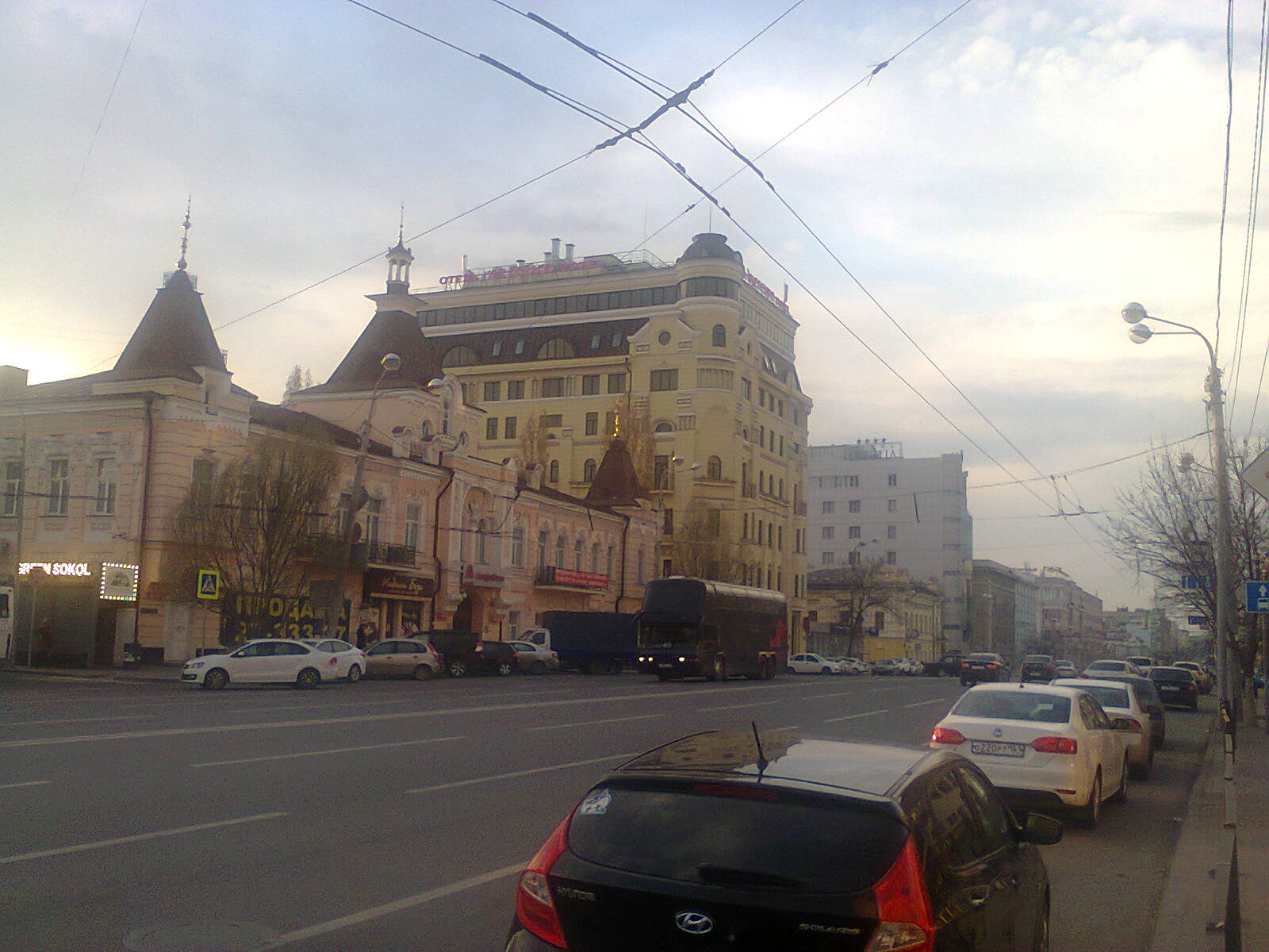 Гостиница "Mercure" в Ростове-на-Дону (пересечение Ворошиловского и Серафимовича)